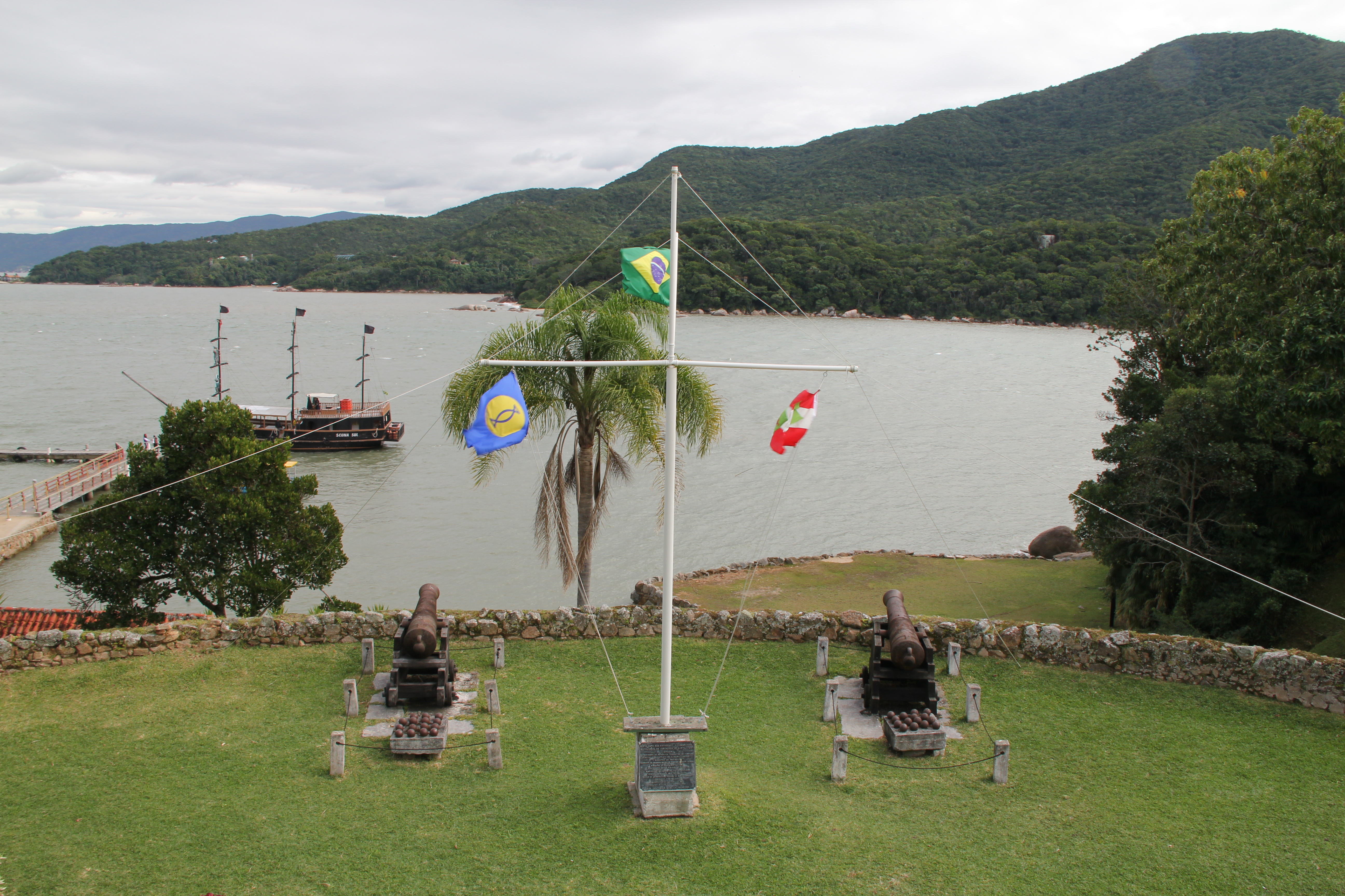 A Fortaleza de Santa Cruz de Anhatomirim, localizada na Ilha de Anhatomirim, foi a principal fortificação do antigo sistema defensivo da Ilha de Santa Catarina, projetada e construída pelo brigadeiro português José da Silva Paes a partir de 1739. Este sistema era composto ainda pelas fortalezas de São José da Ponta Grossa, Santo Antônio de Ratones e Nossa Senhora da Conceição de Araçatuba.